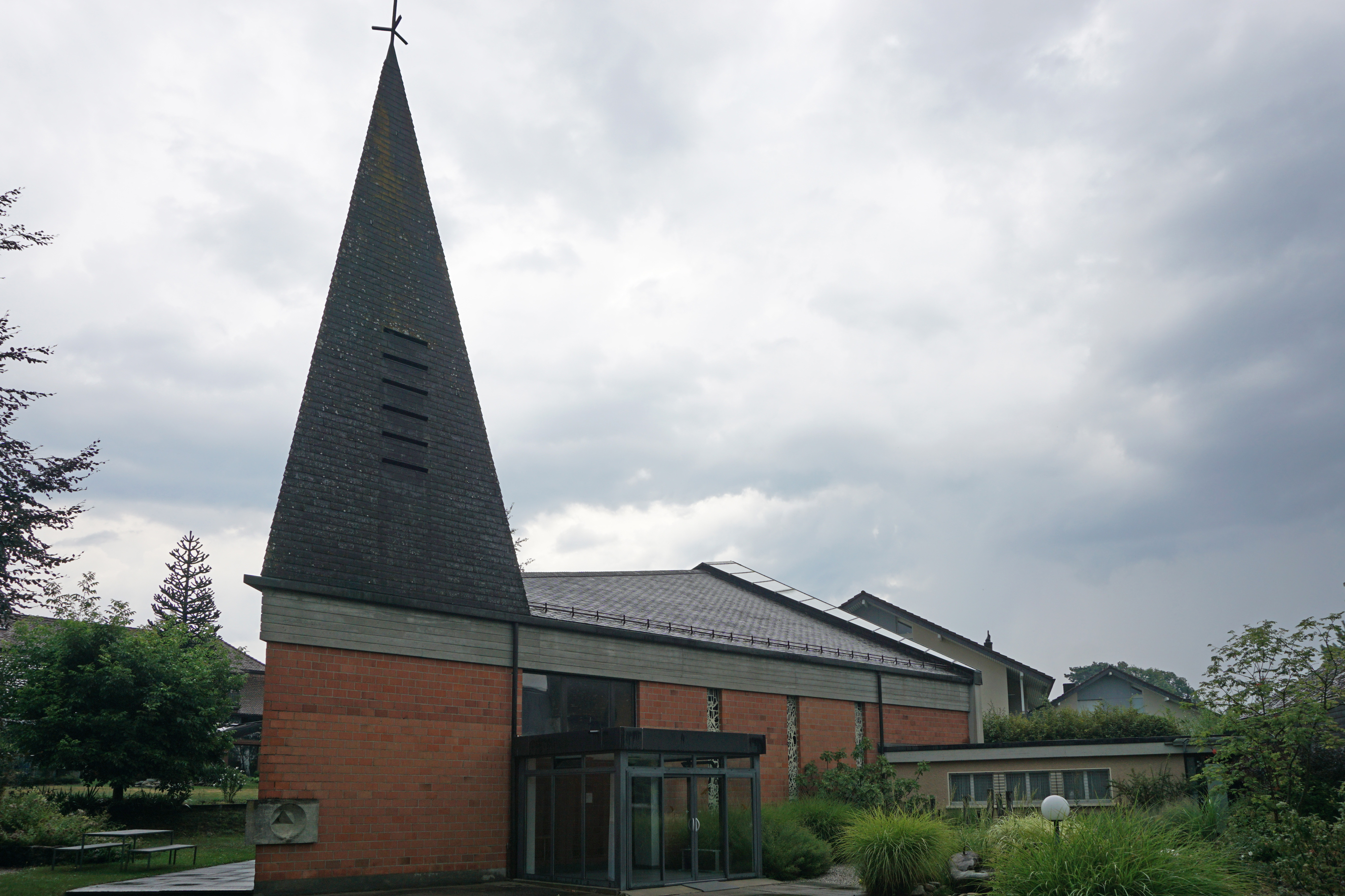 Römisch-katholische Kirche St. Maria von Ins.